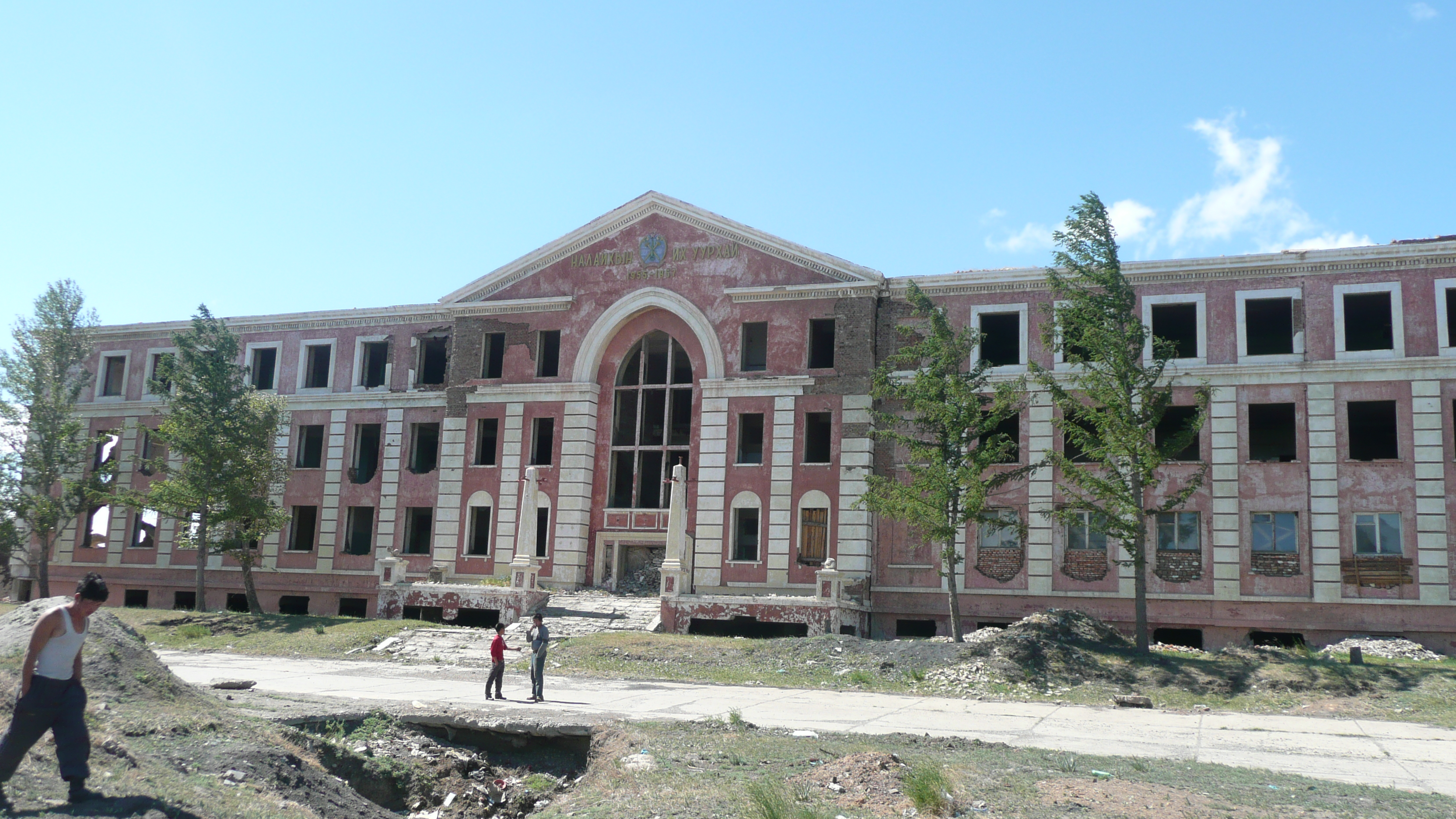 Altes Bergwerk in der Bergbaustadt Nalaikh unweit von Ulan Bator